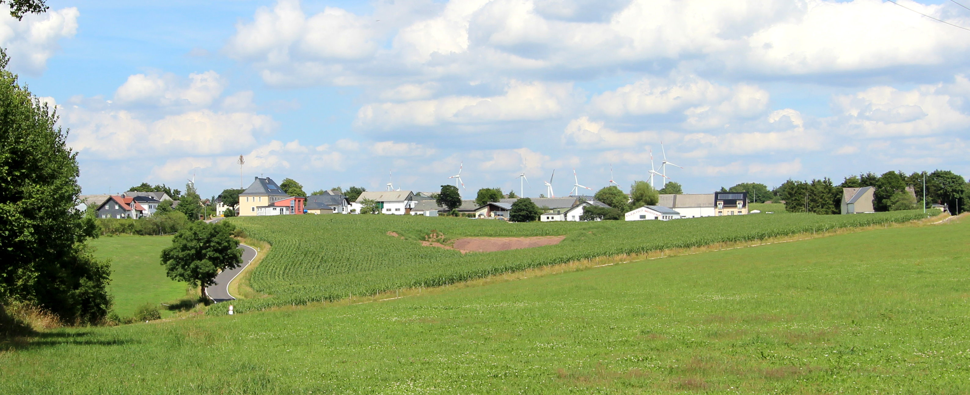 54597 Roth bei Prüm, von der K 161 in Richtung Kobscheid. Aufnahme von 2017.